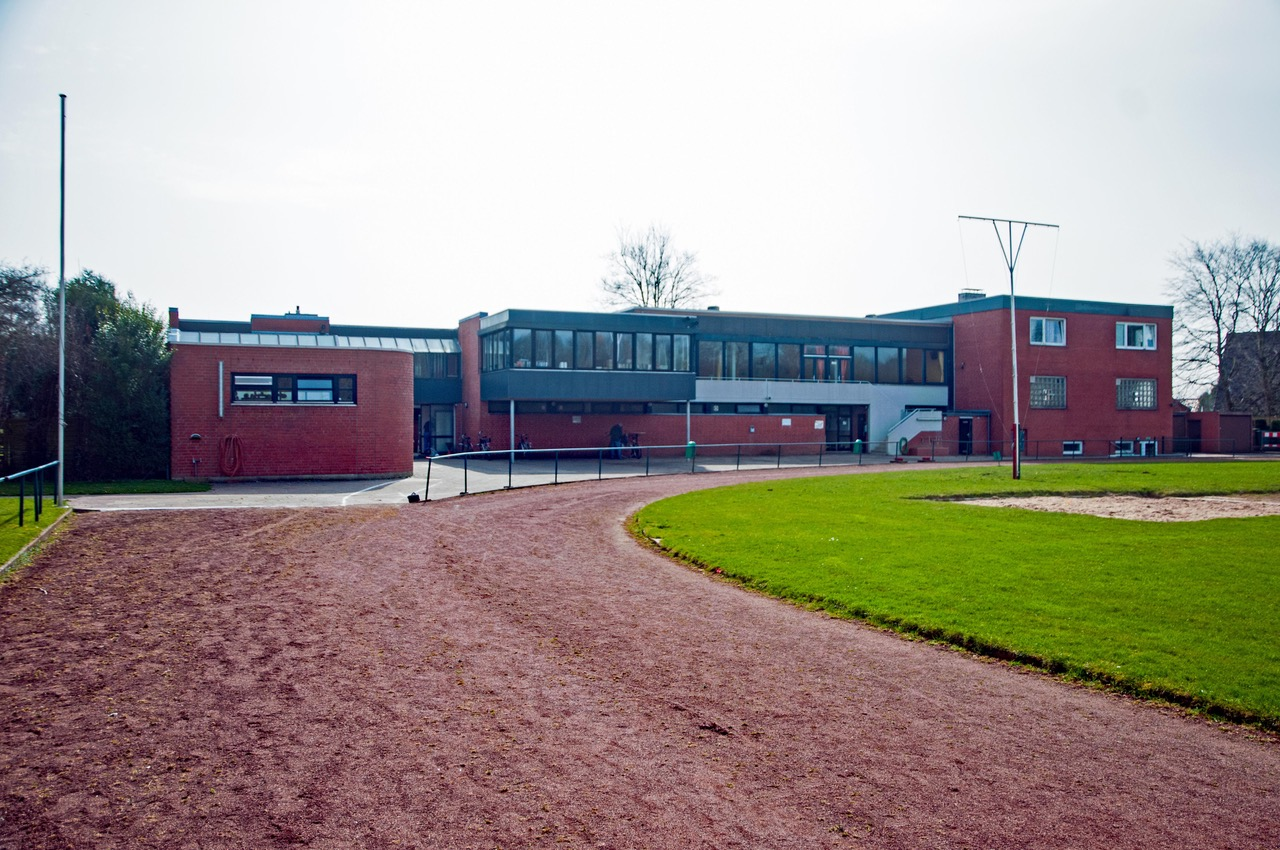 TuS Holtenau Verensheim